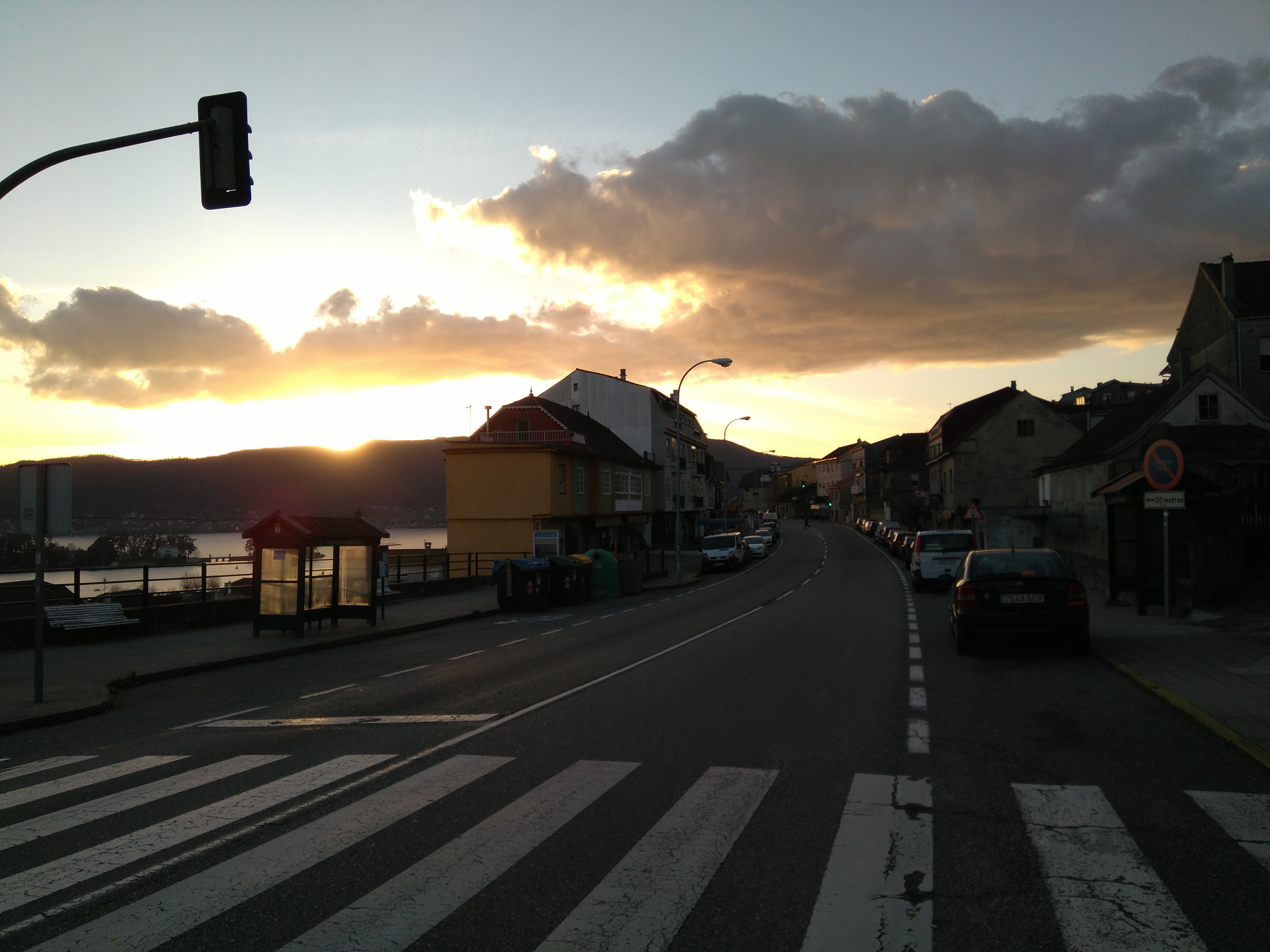 Alto do Ostrás, na parroquia de Cesantes, Redondela.